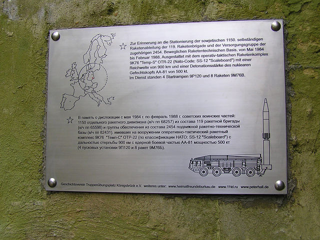 Gedenktafel der 119. Raketenbrigade